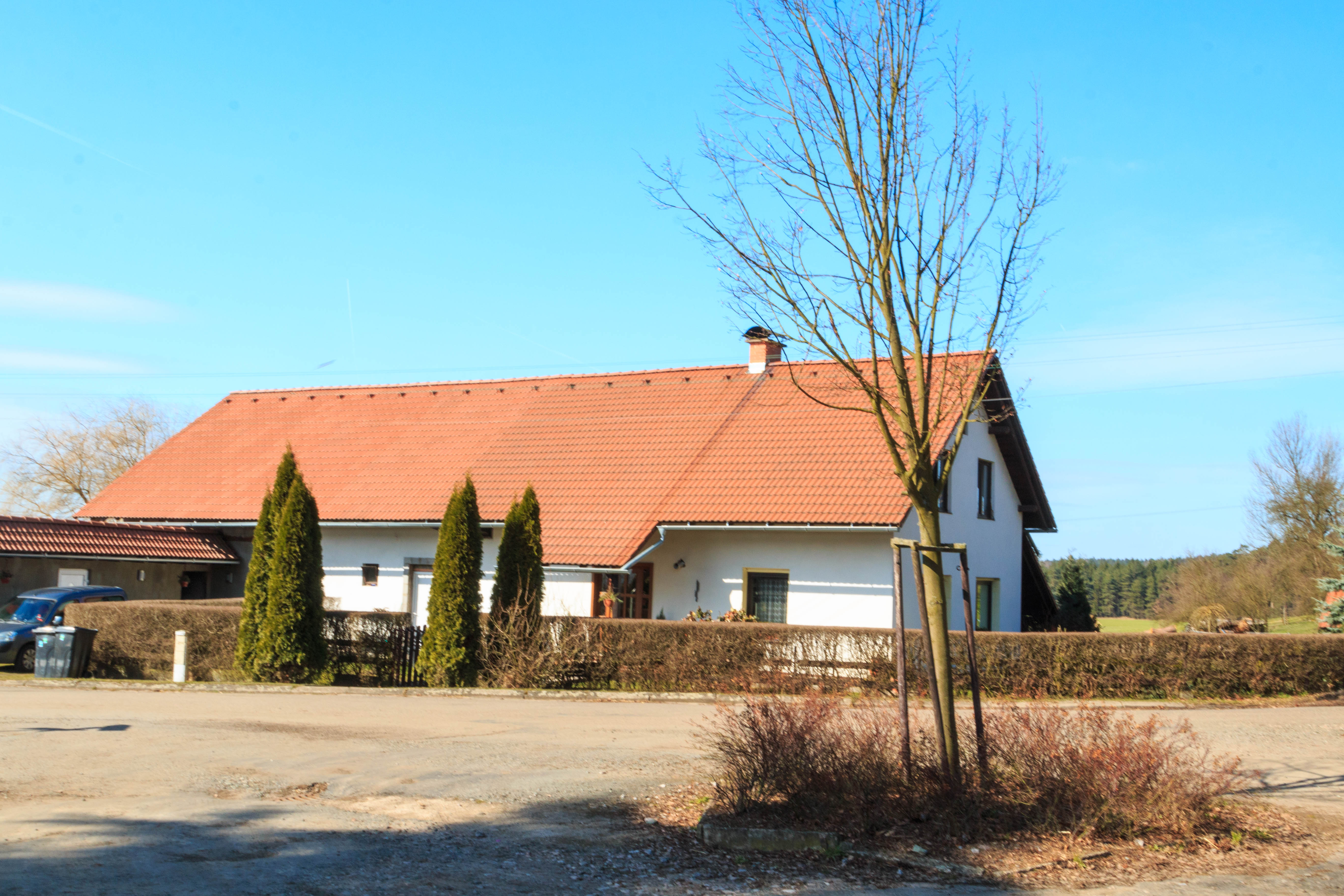 Kozodry - čp. 2